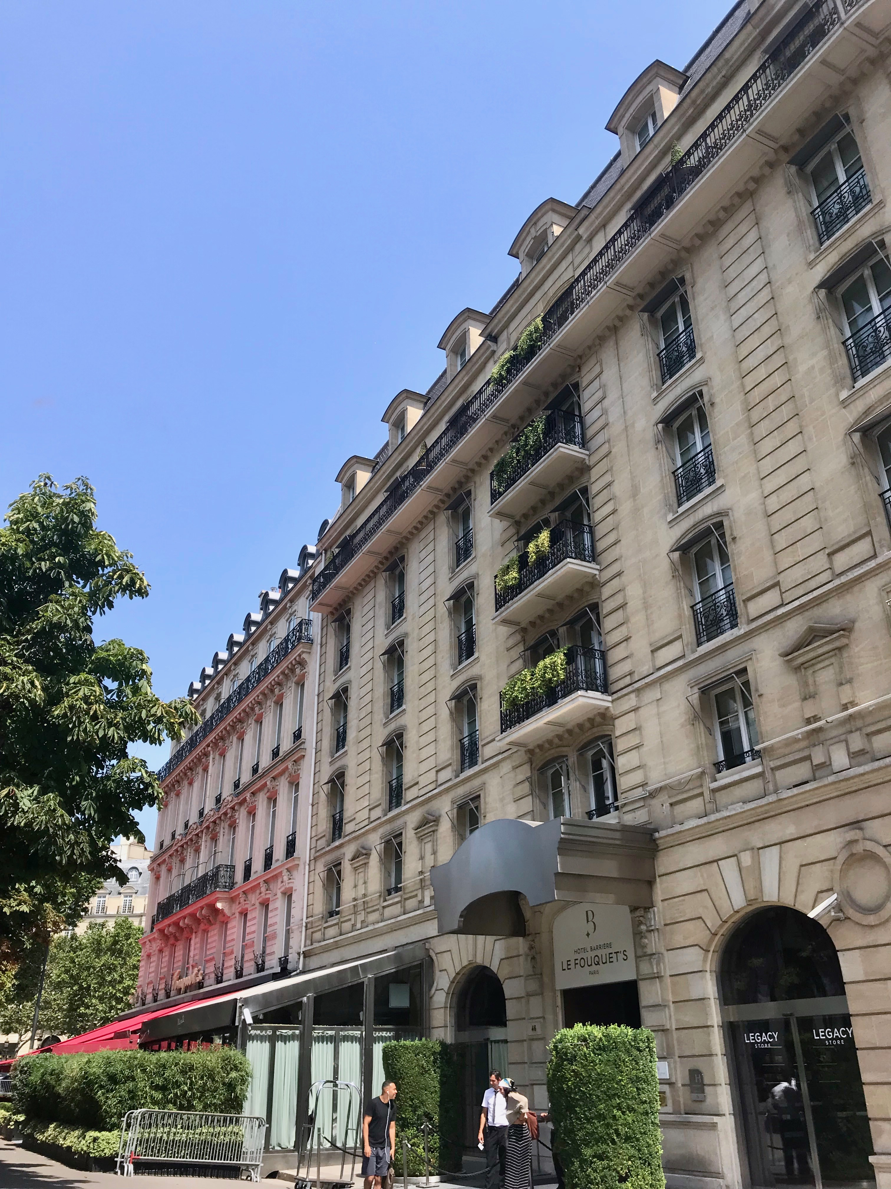 Entrée de l'hôtel Fouquet's